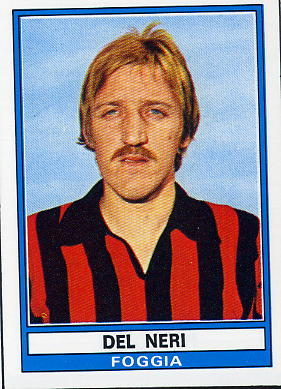 Luigi Del Neri che indossa la maglia del Foggia